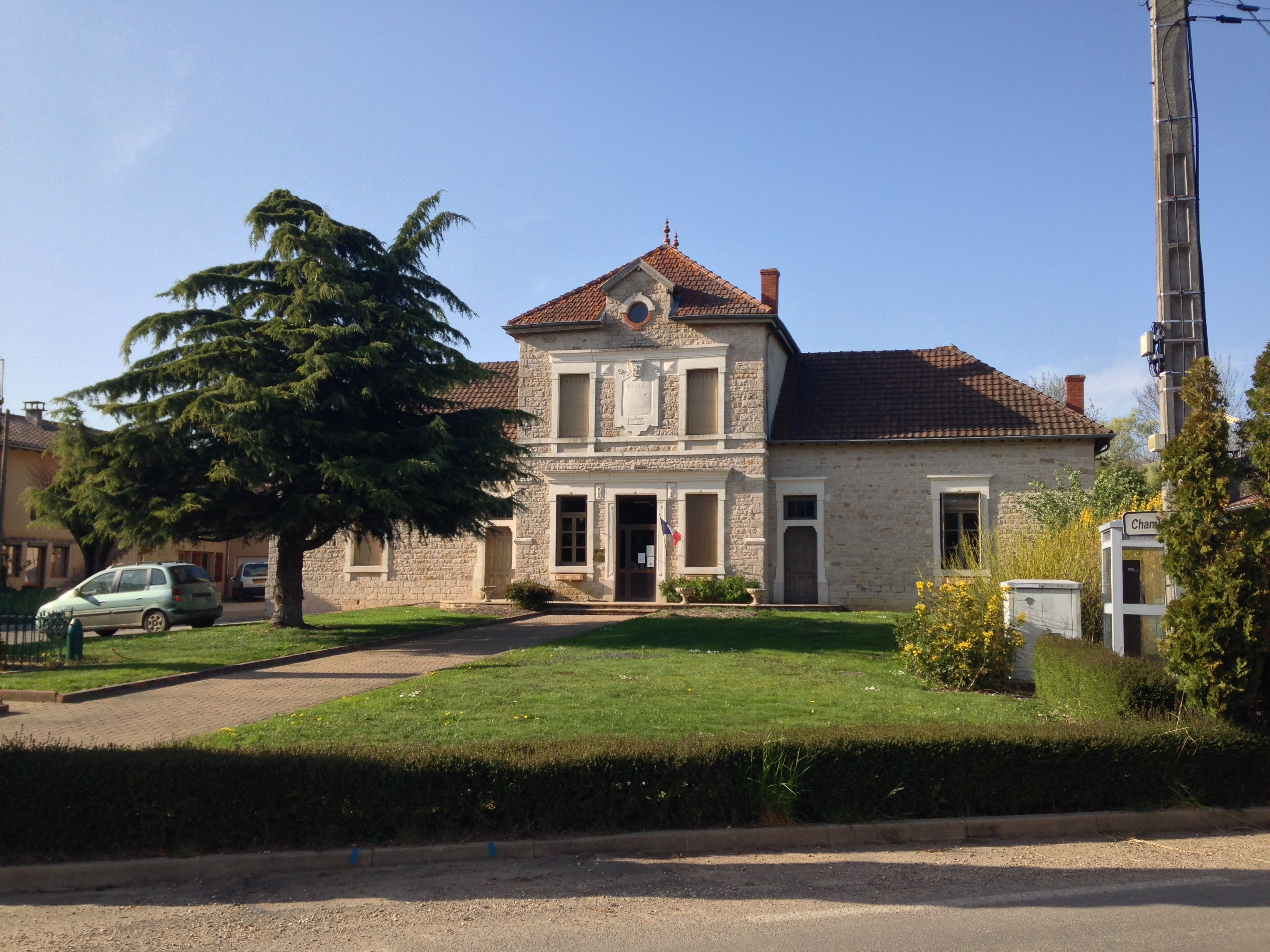 Mairie de Dommartin